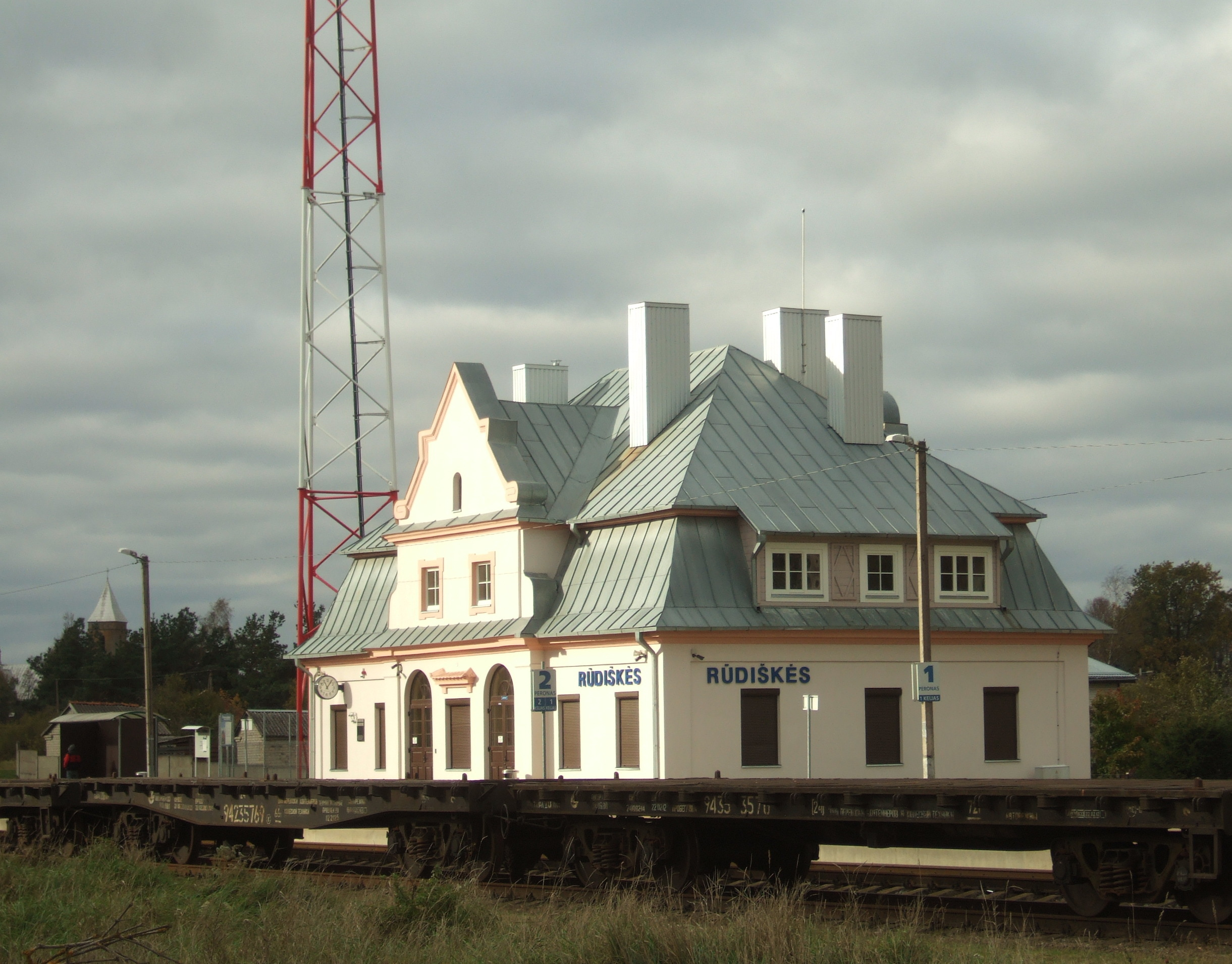 Rūdiškių geležinkelio stotis